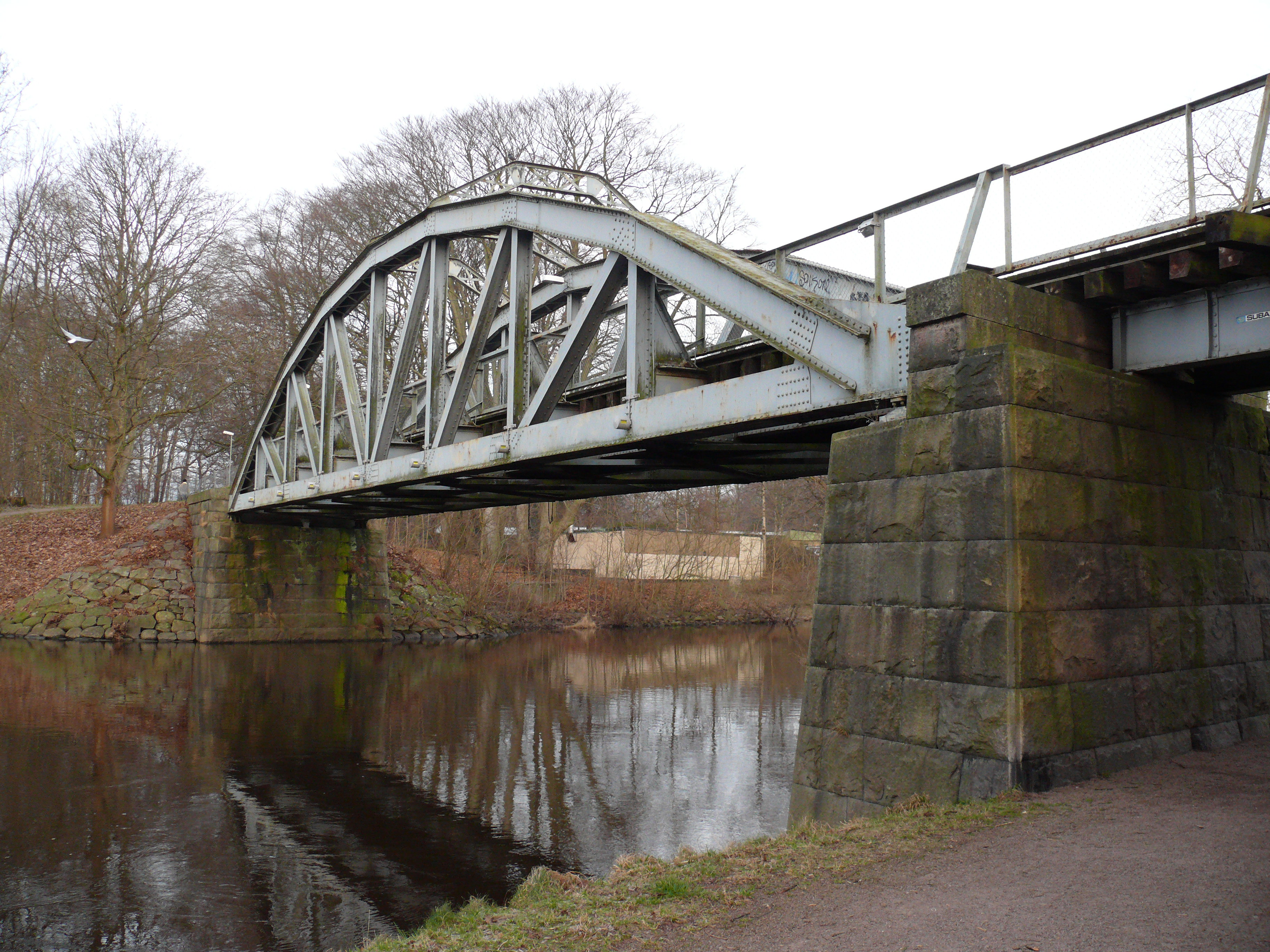 Bron Pyttebron i centrala Ängelholm.